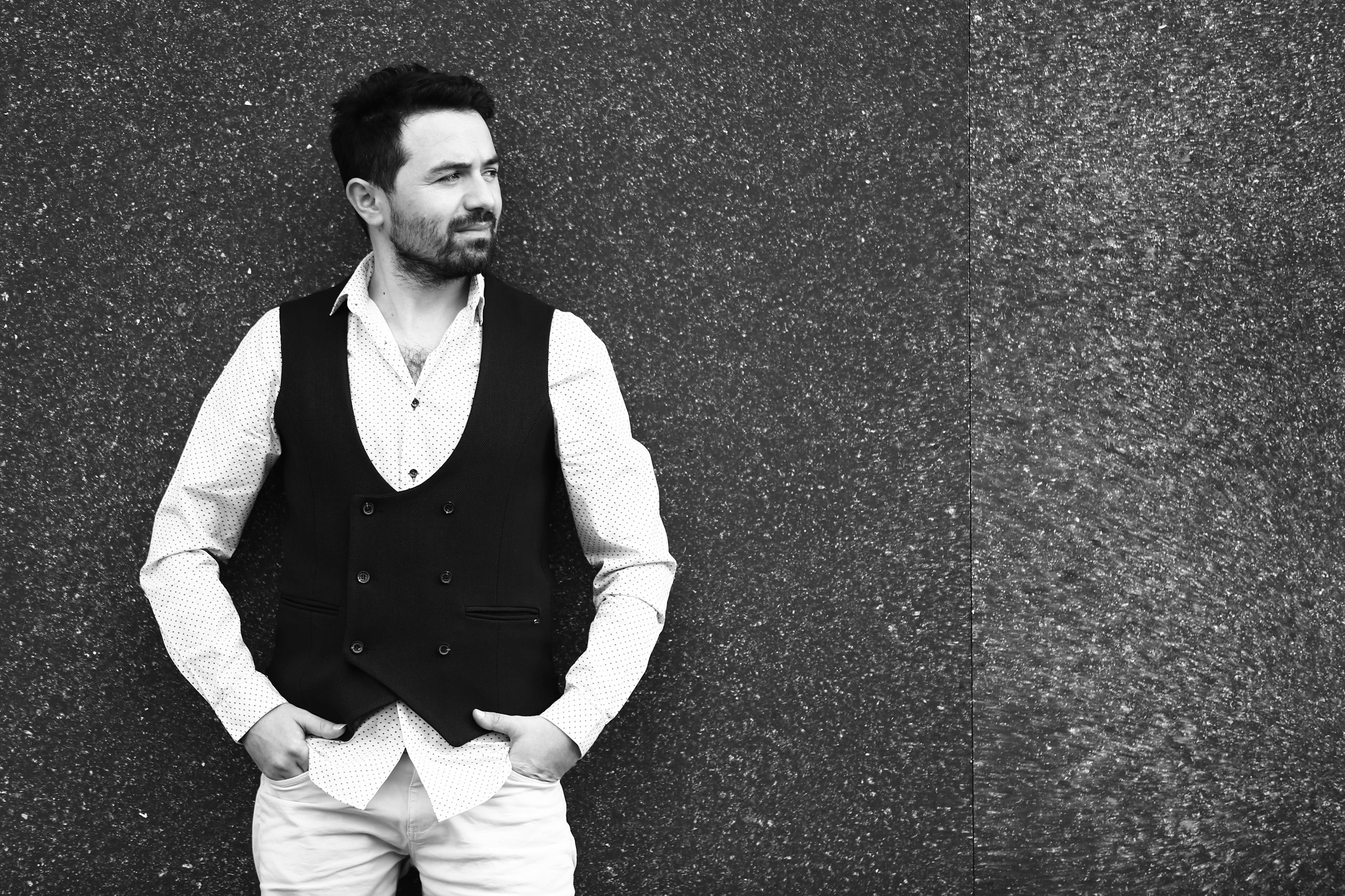 Fotograf